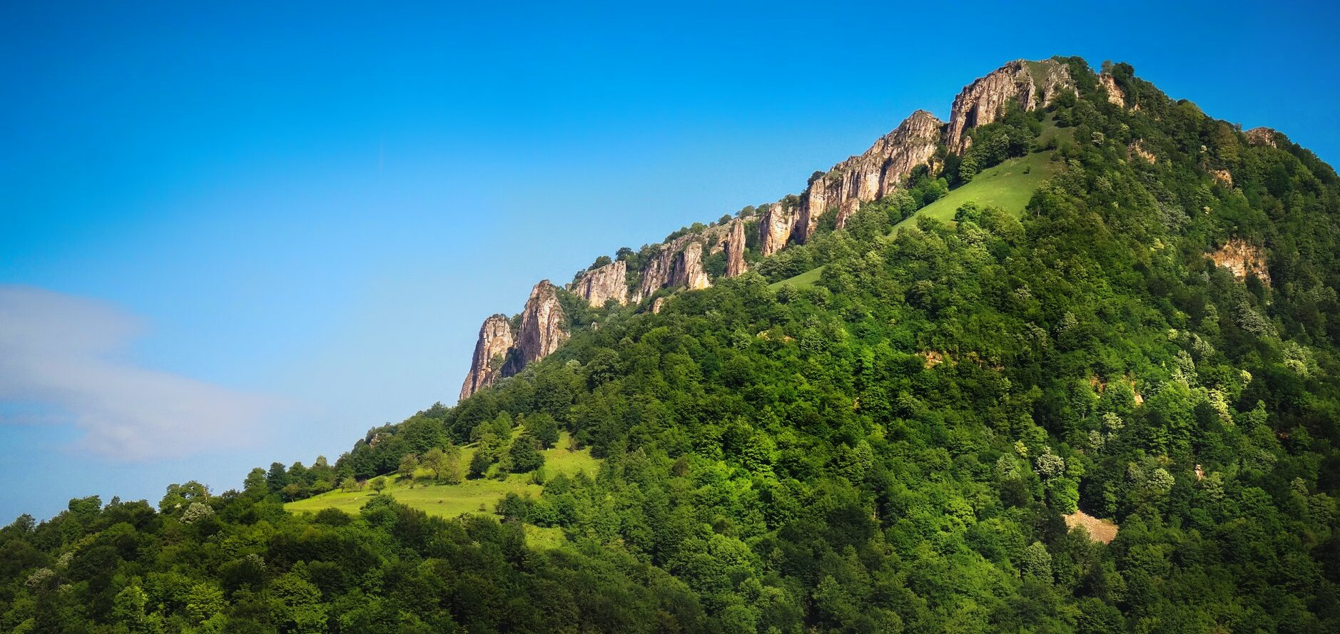 Тетевенски Балкан